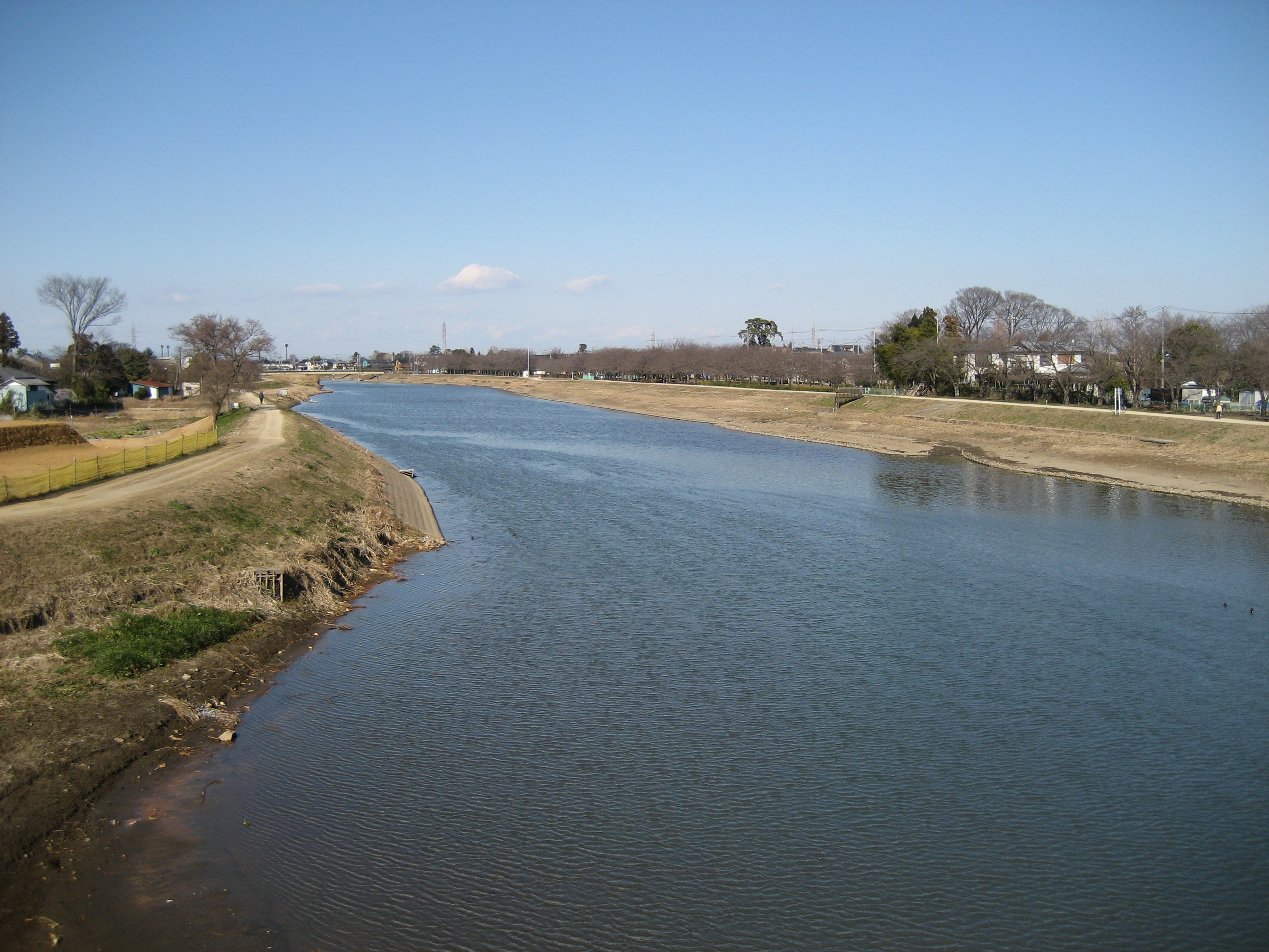 大落古利根川埼玉県春日部市ユリノキ橋付近から上流を望む